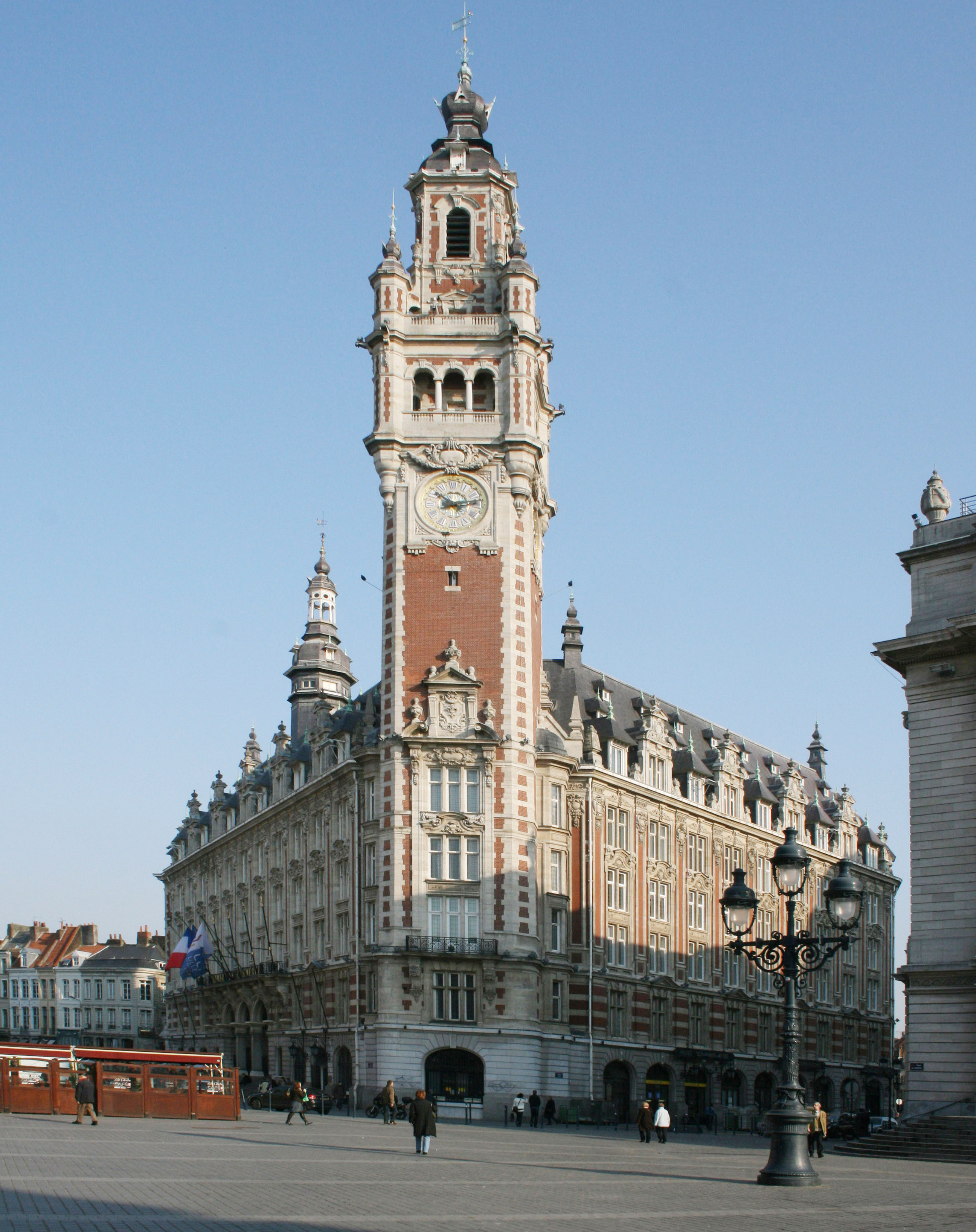 Chambre de Commerce & d'Industrie de Lille